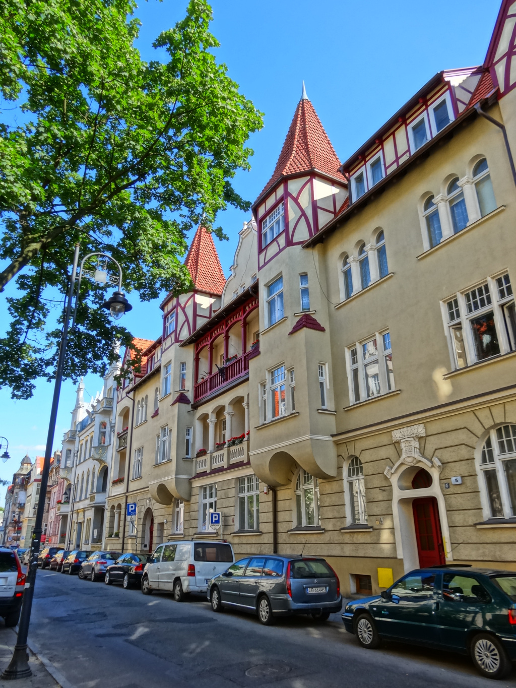 Ulica Augusta Cieszkowskiego w Bydgoszczy – pierzeja południowa